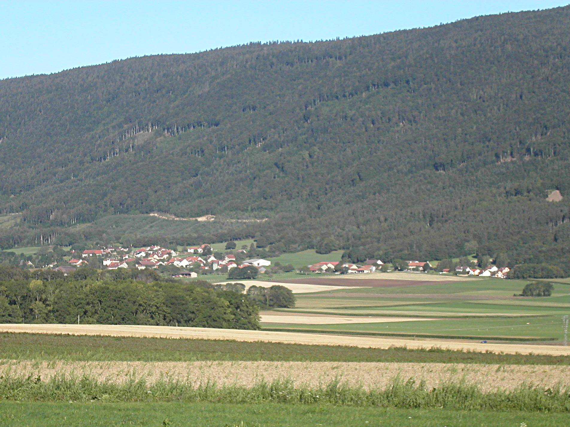 Vue du village de Berolle, canton de Vaud, Suisse. Auteur : Marc Mongenet Date : 18 août 2006